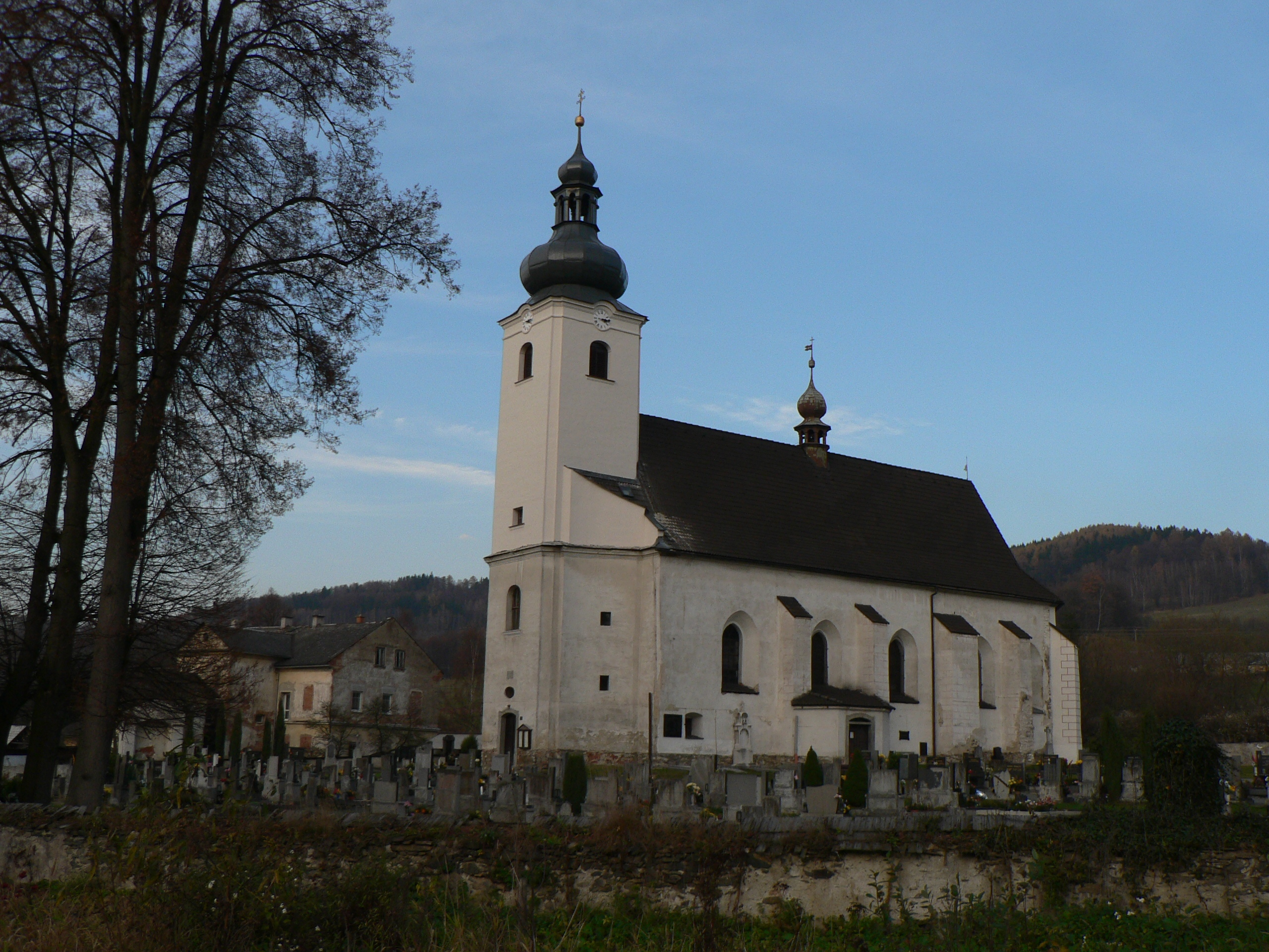 Kostel svatého Vavřince (Sobotín)